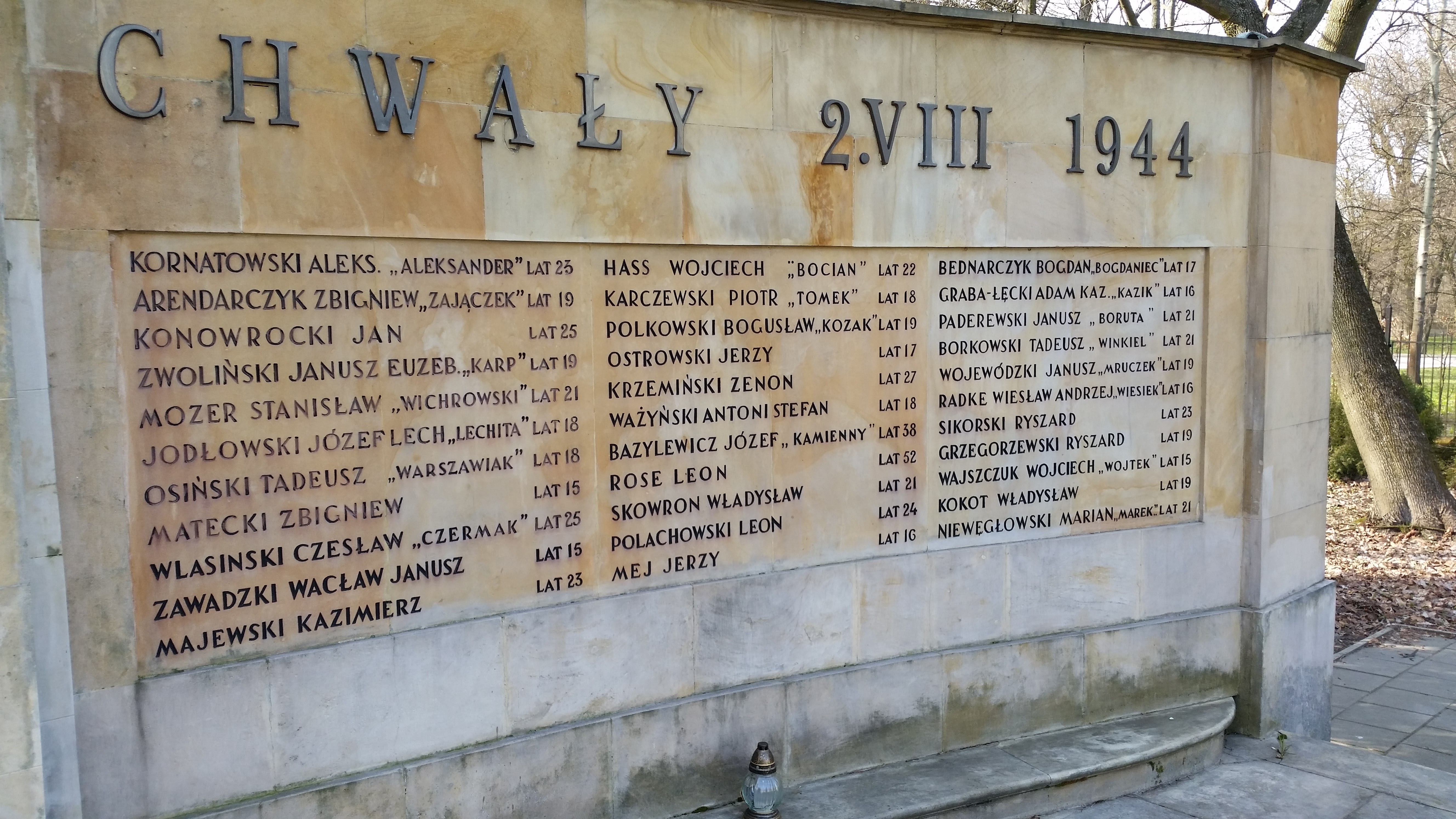 Pomnik Żołnierzy Armii Krajowej z IV Oddziału Ochota, walczących w Powstaniu Warszawskim, poległych 2 sierpnia 1944